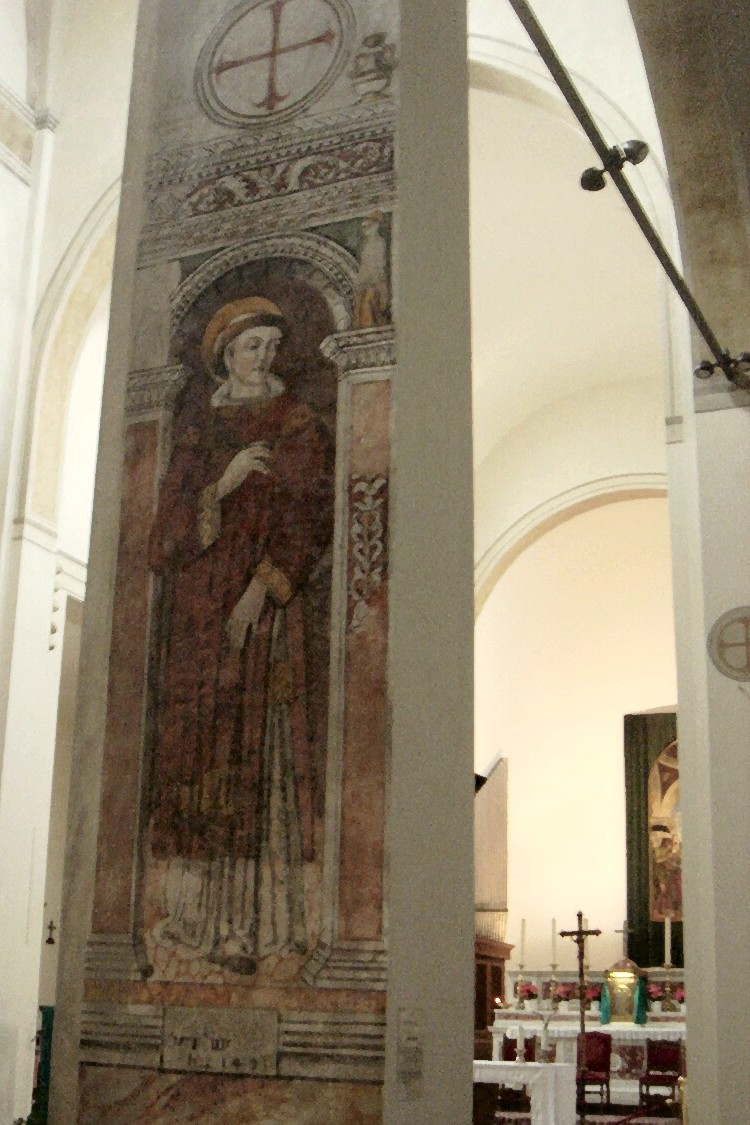 Conegliano: interno del Duomo, affresco con San Lorenzo, opera di Jacopo Collet da Arten e Desiderio da Feltre, del XV secolo.